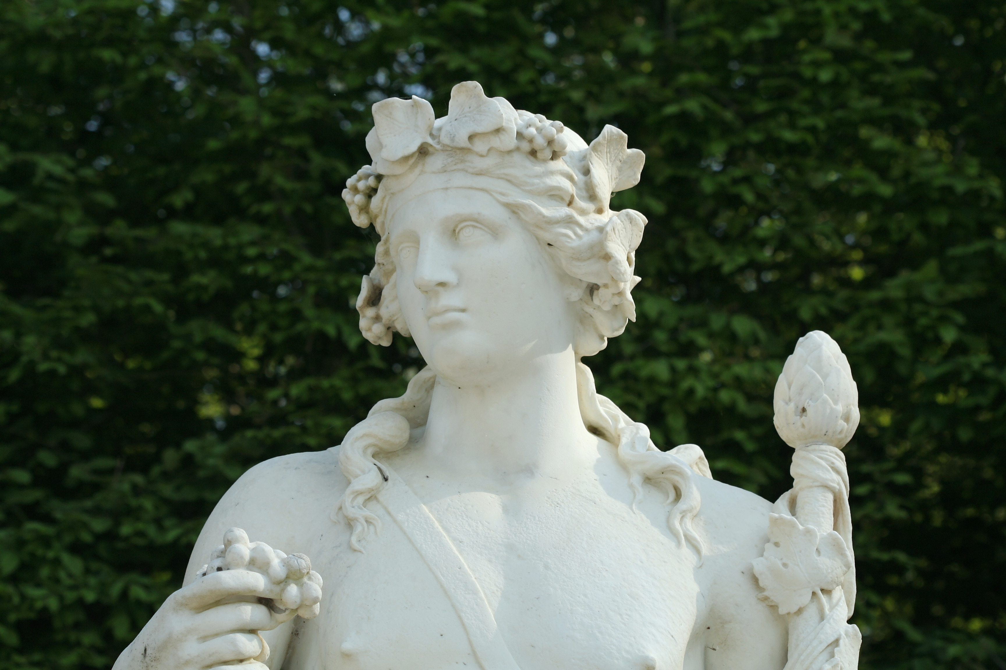 Parc de Versailles, demi-lune du bassin du Char-d'Apollon. Bacchus, Jean-Melchior Raon, 1687-1689.